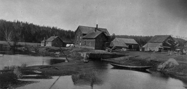 Pittston Farm, Pittston, Maine.